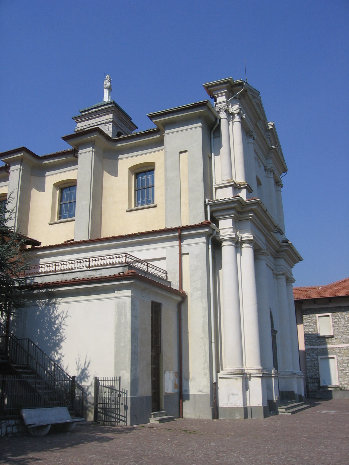 Parzanica, Bergamo, Italy